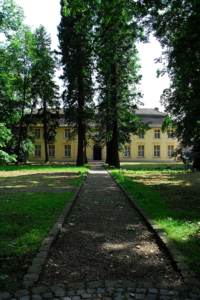 Haus Hohenbusch